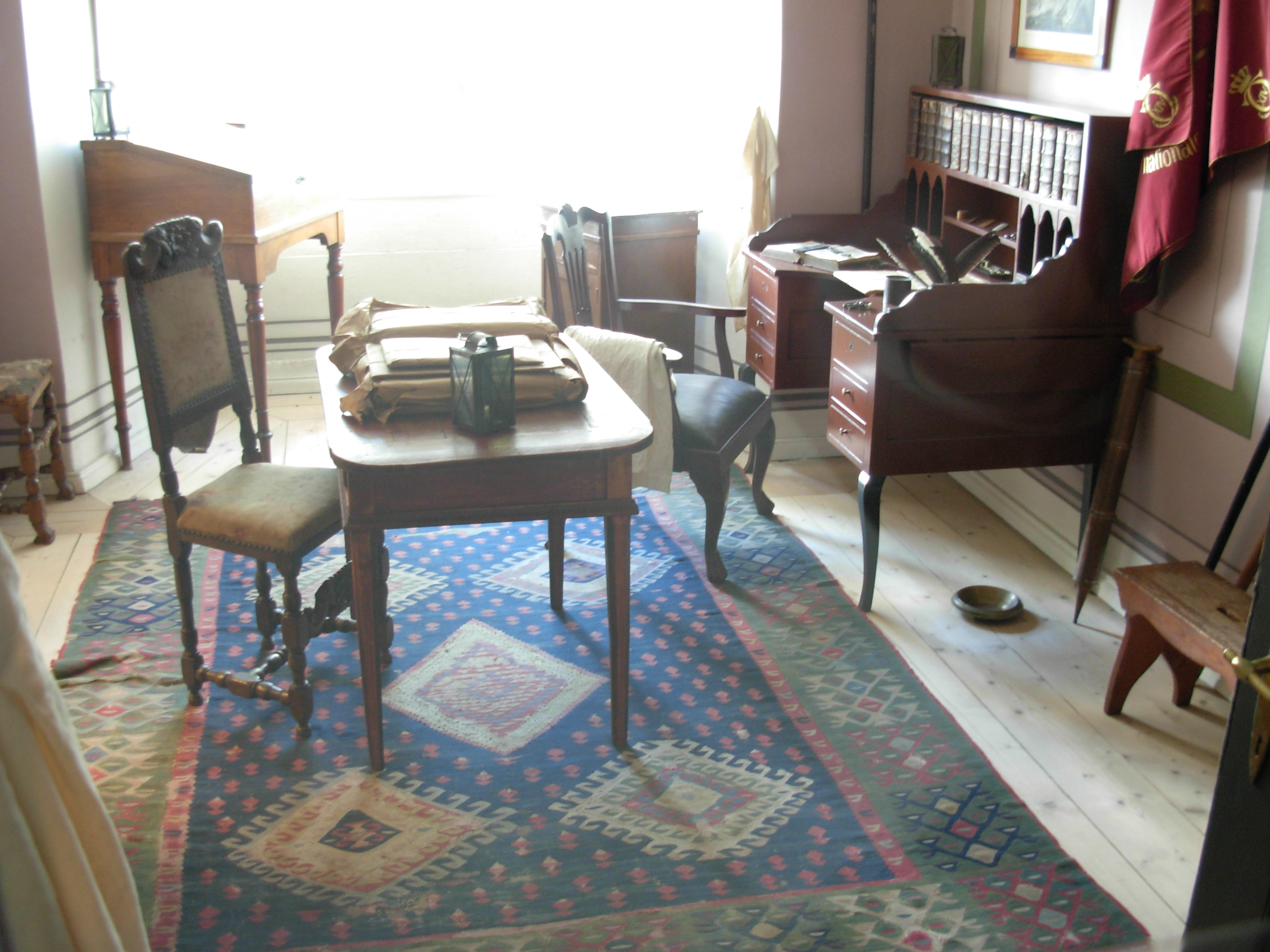 Bureau à gradin au comptoir Henrik Wergelands, Akershus castle, Norvège